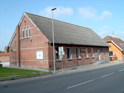 Sall Forsamlingshus i Sall by og sogn.